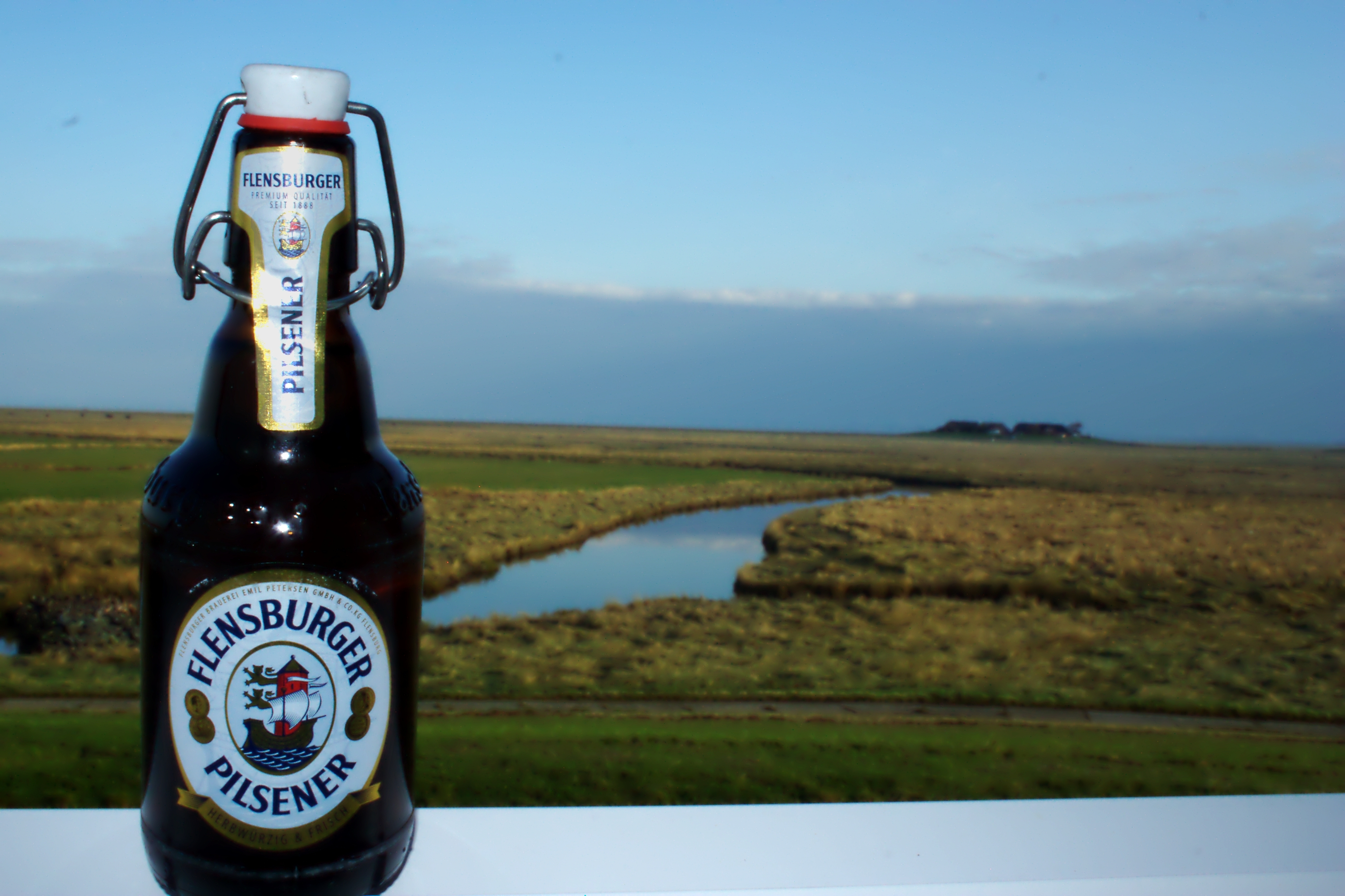 Flens vor Hallig Langeneß - Blick von Peterswarf (1. Stock) nach Norden